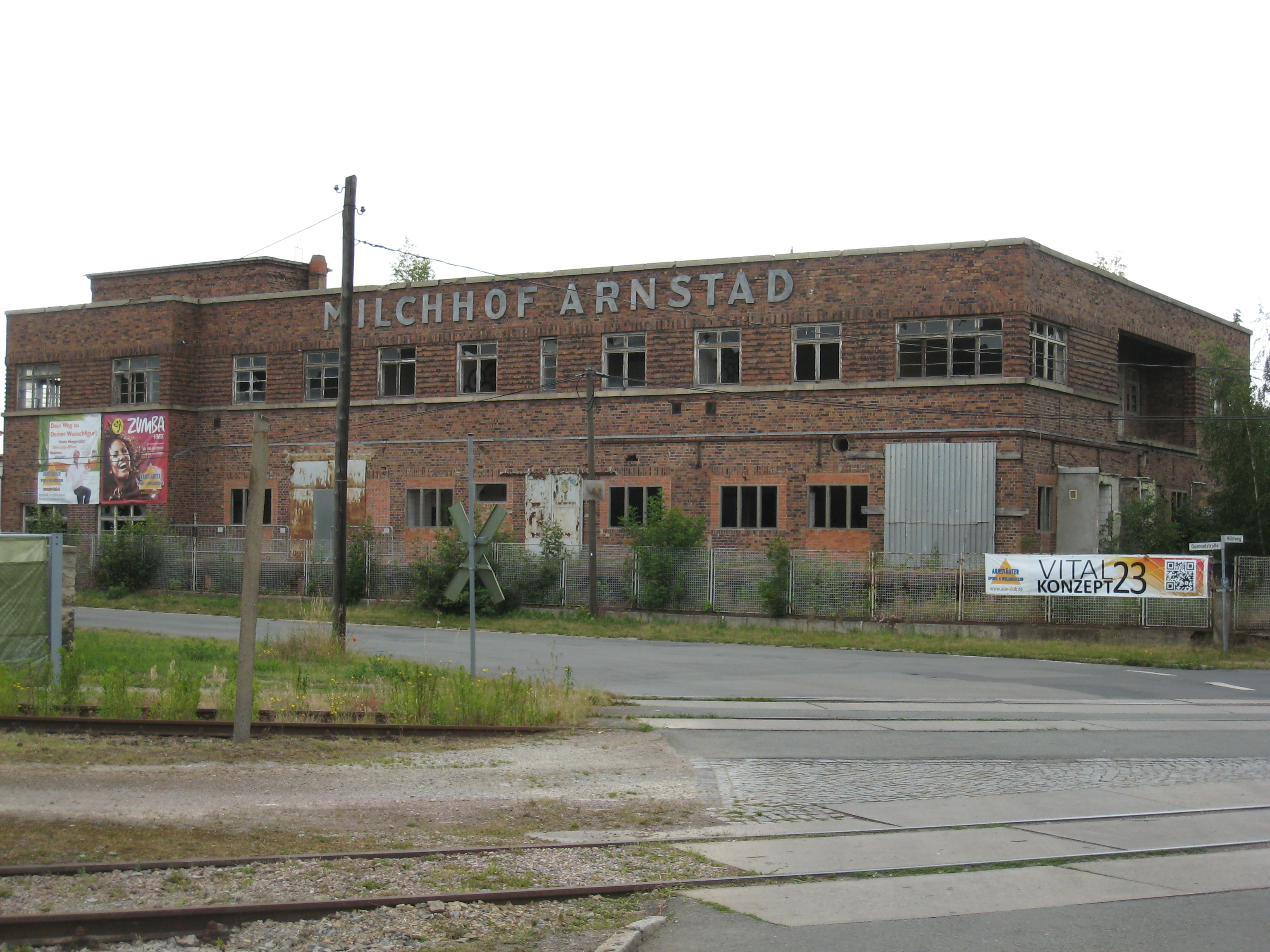 Ehem. Molkerei / Milchhof in Arnstadt, Quenselstraße